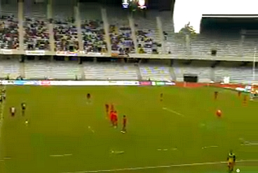 match de rugby Super Liga 2013 disputé au Cluj Arena opposant U Cluj au Steaua Bucarest